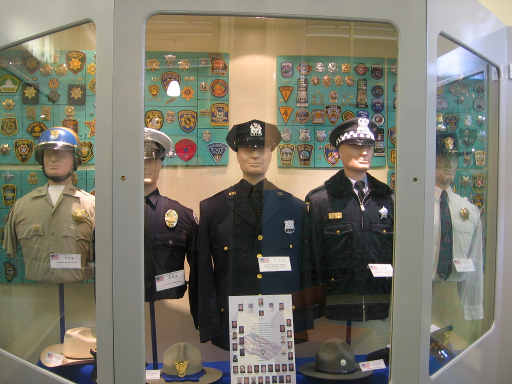 Police Museum, Glasgow